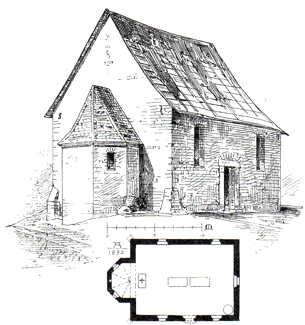 Maternuskapelle, Haus Bürgel bei Monheim/Rhein